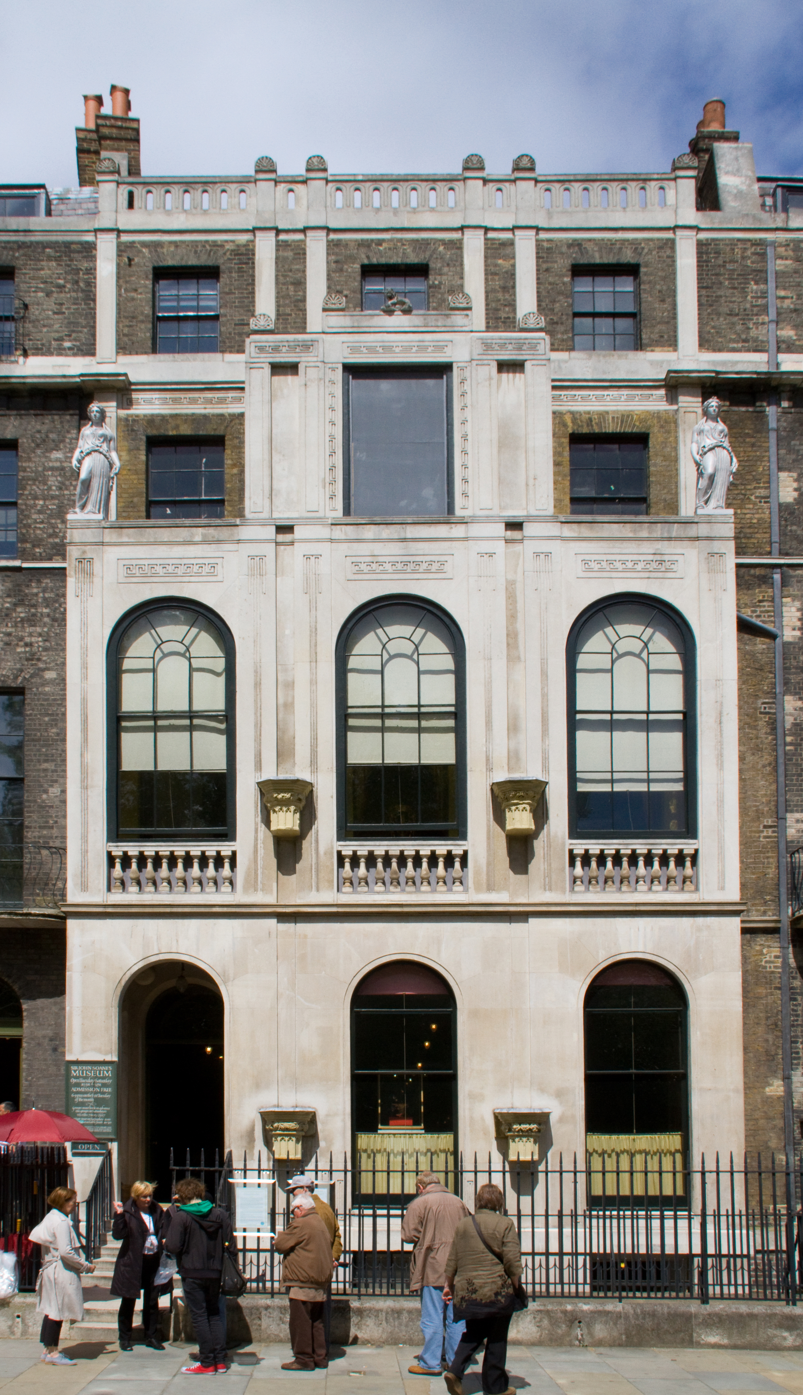 Sir John Soane Museum